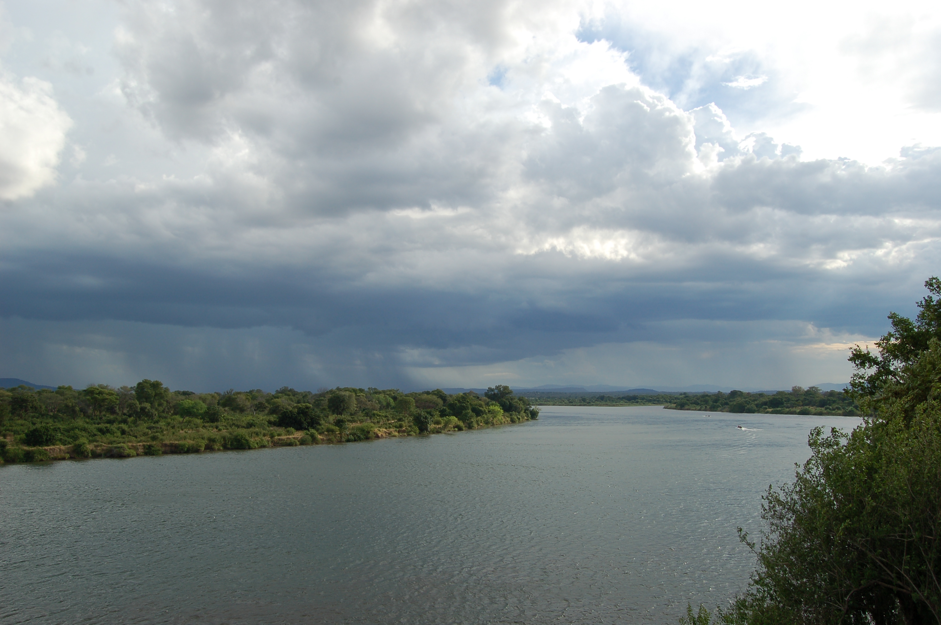 Lower Zambezi, Zambia